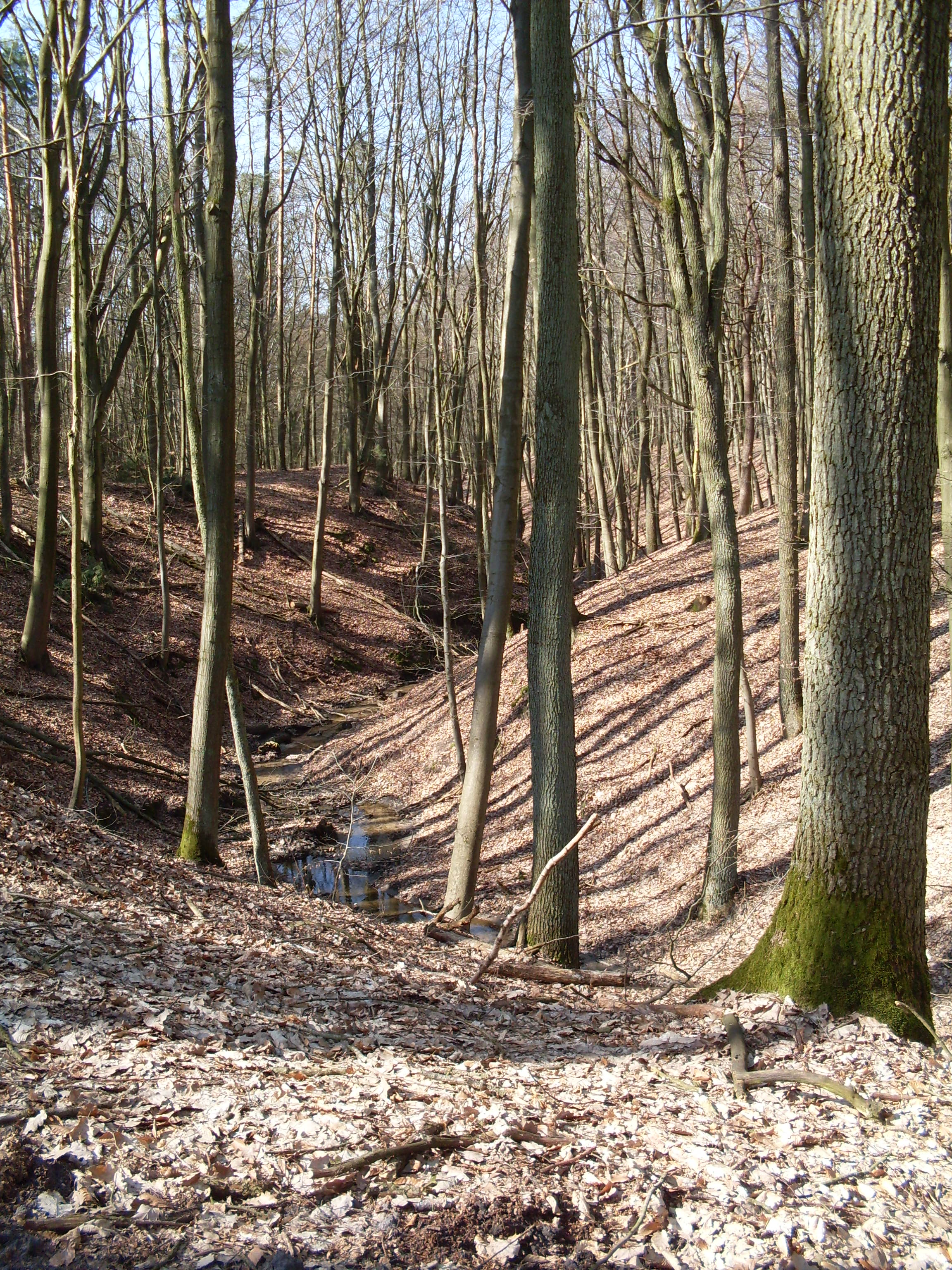 Strumień Grzybnica - granica między gminą Police a Szczecinem